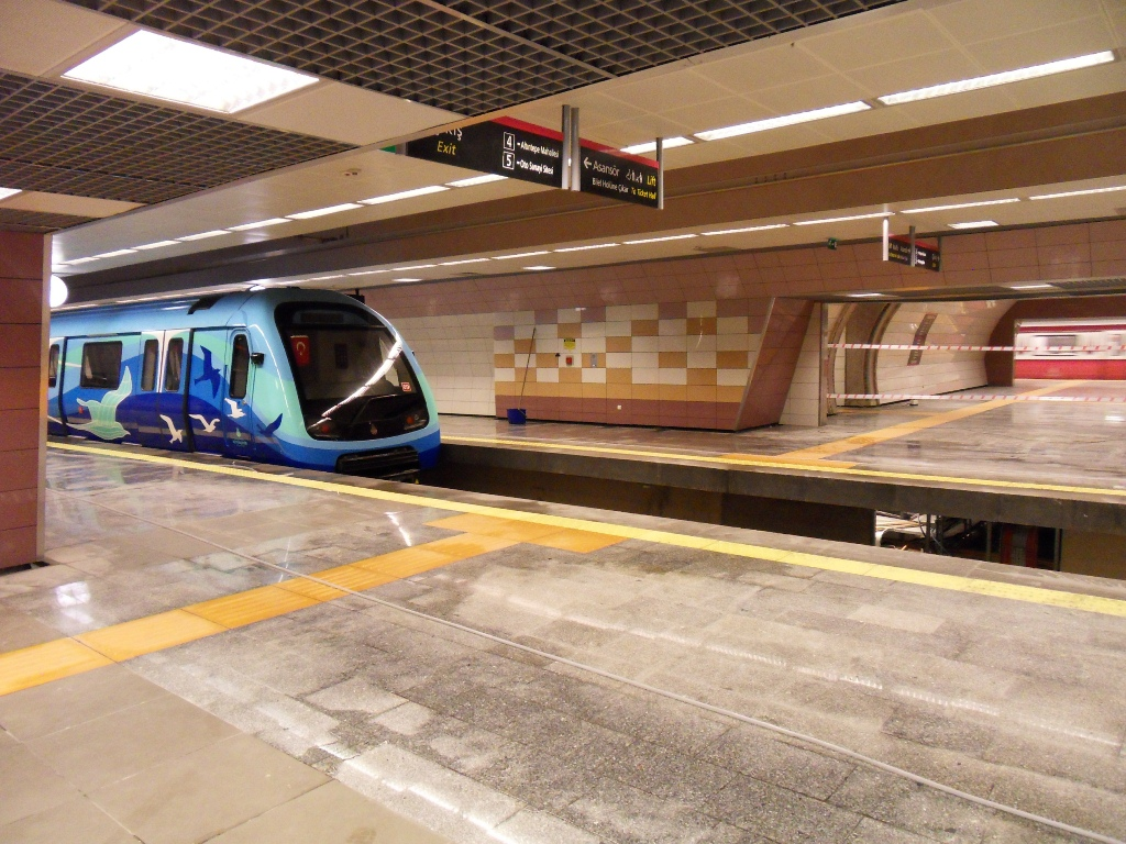 Üç peronlu Bostancı istasyonu.